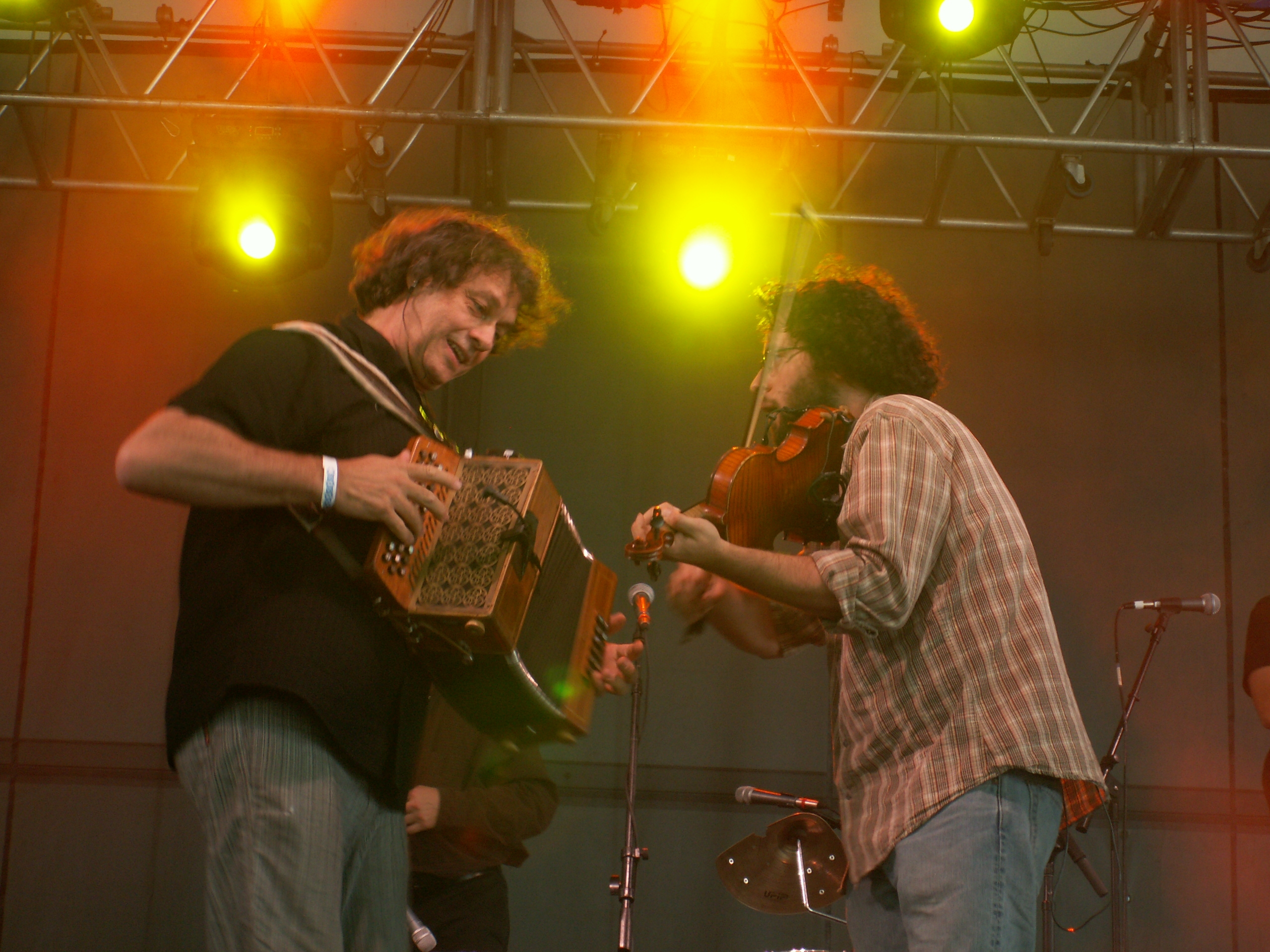 Groupe La Bottine souriante